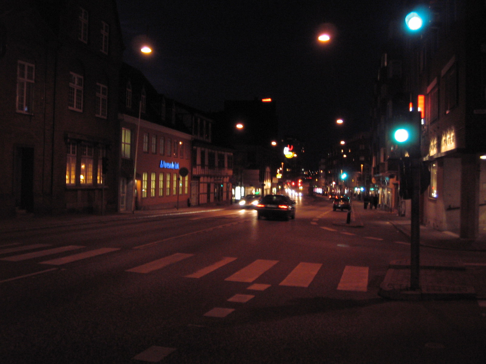 Vesterbro by night